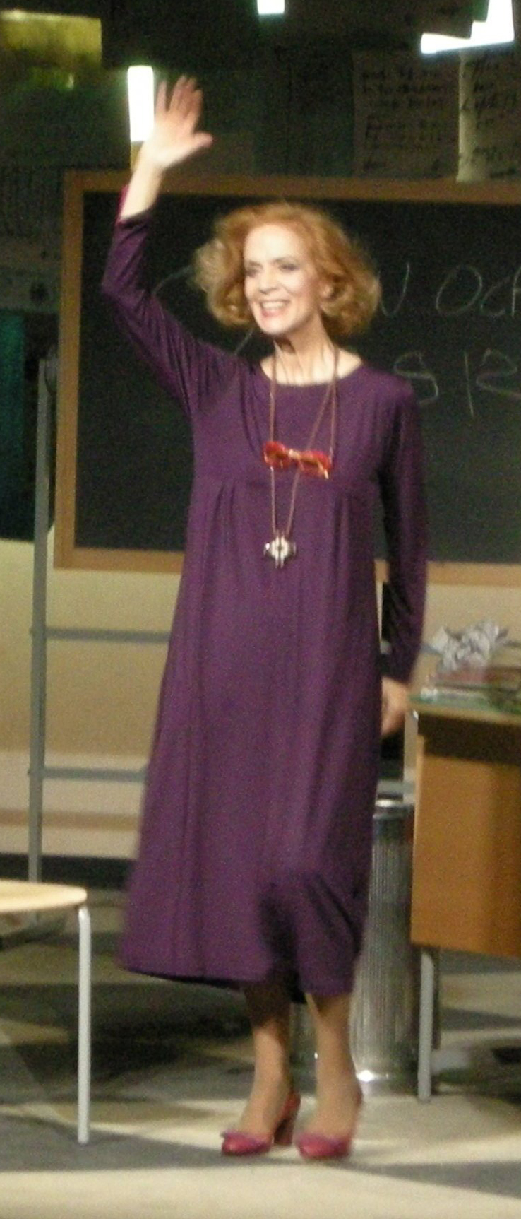 Lucia poli